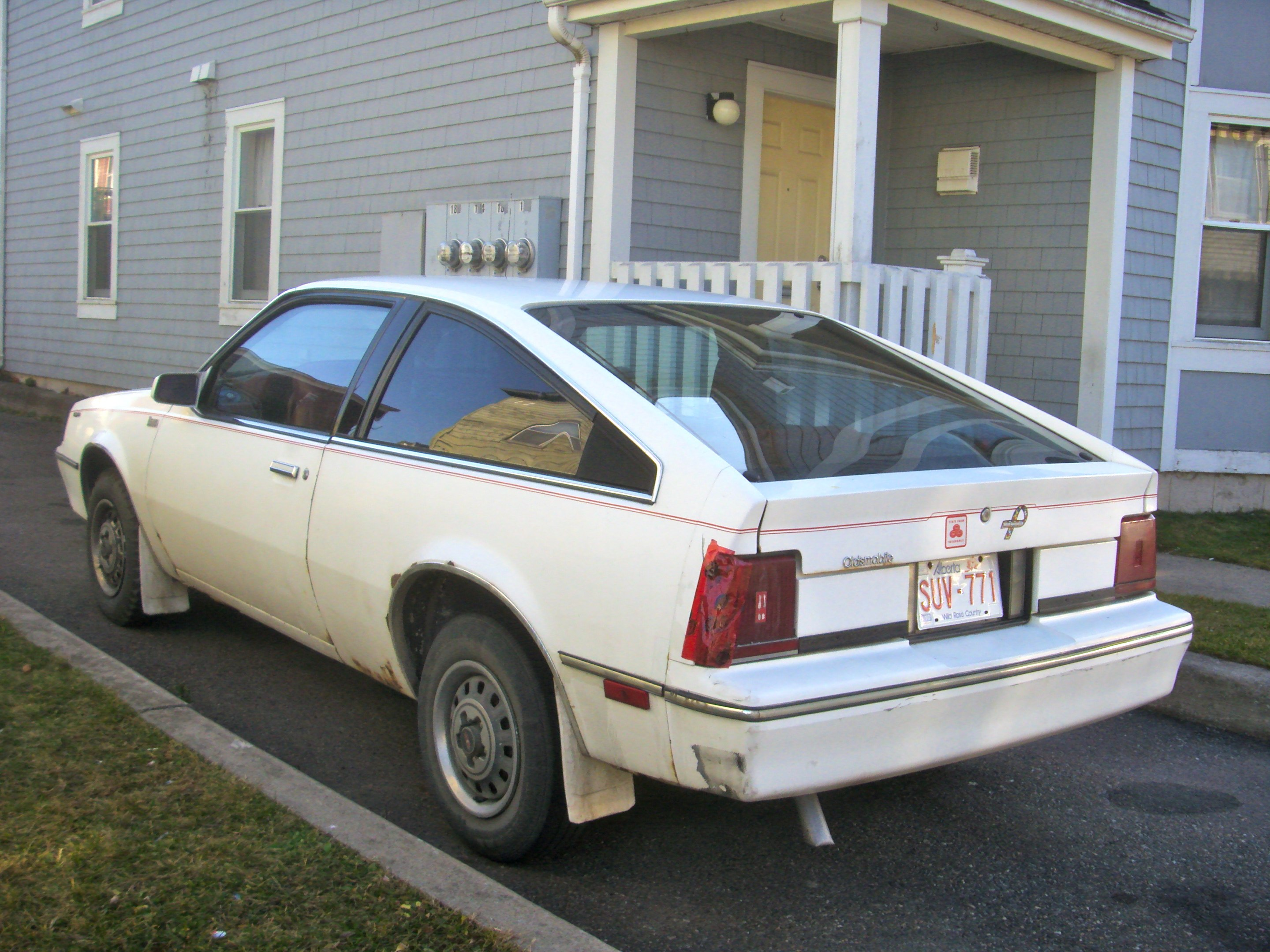 1984-85 Oldsmobile Firenza Hatchback.